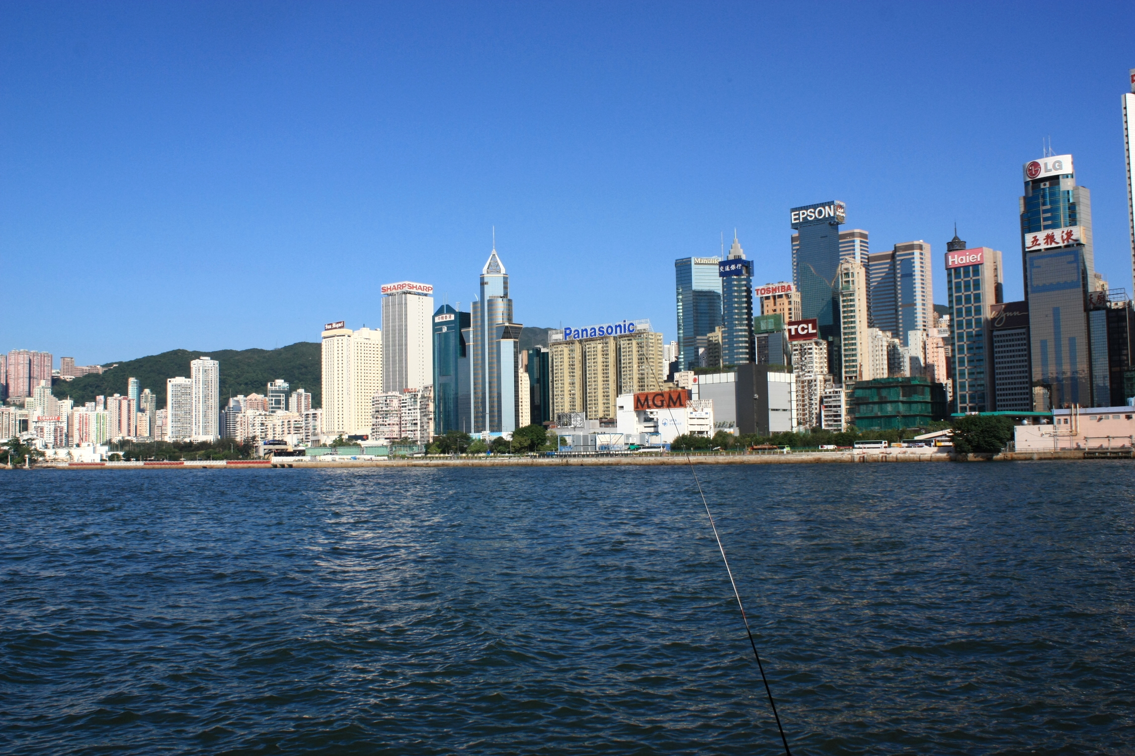 Causeway Bay Buildings